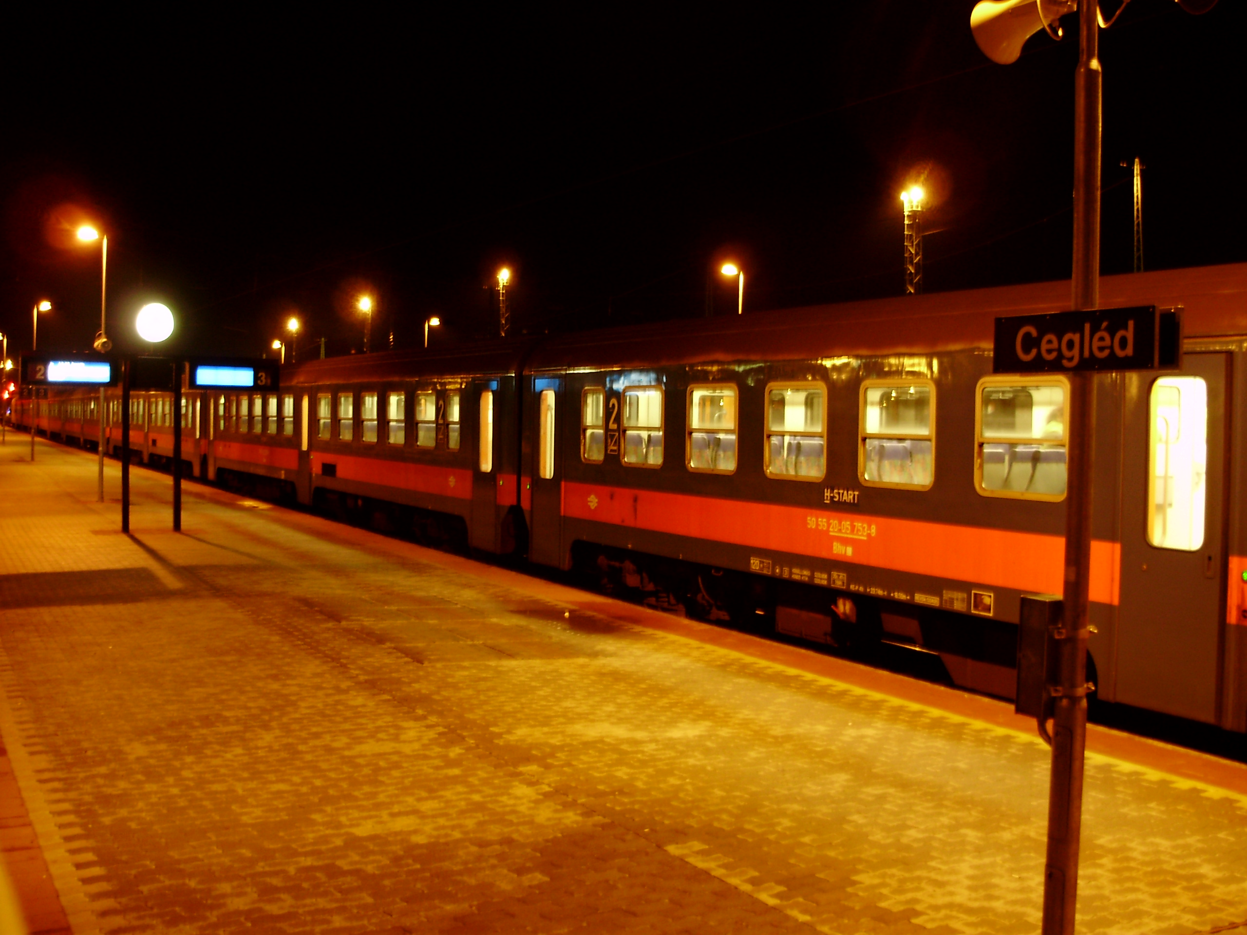 Vasúti szerelvény Cegléd állomáson (éjszakai felvétel)